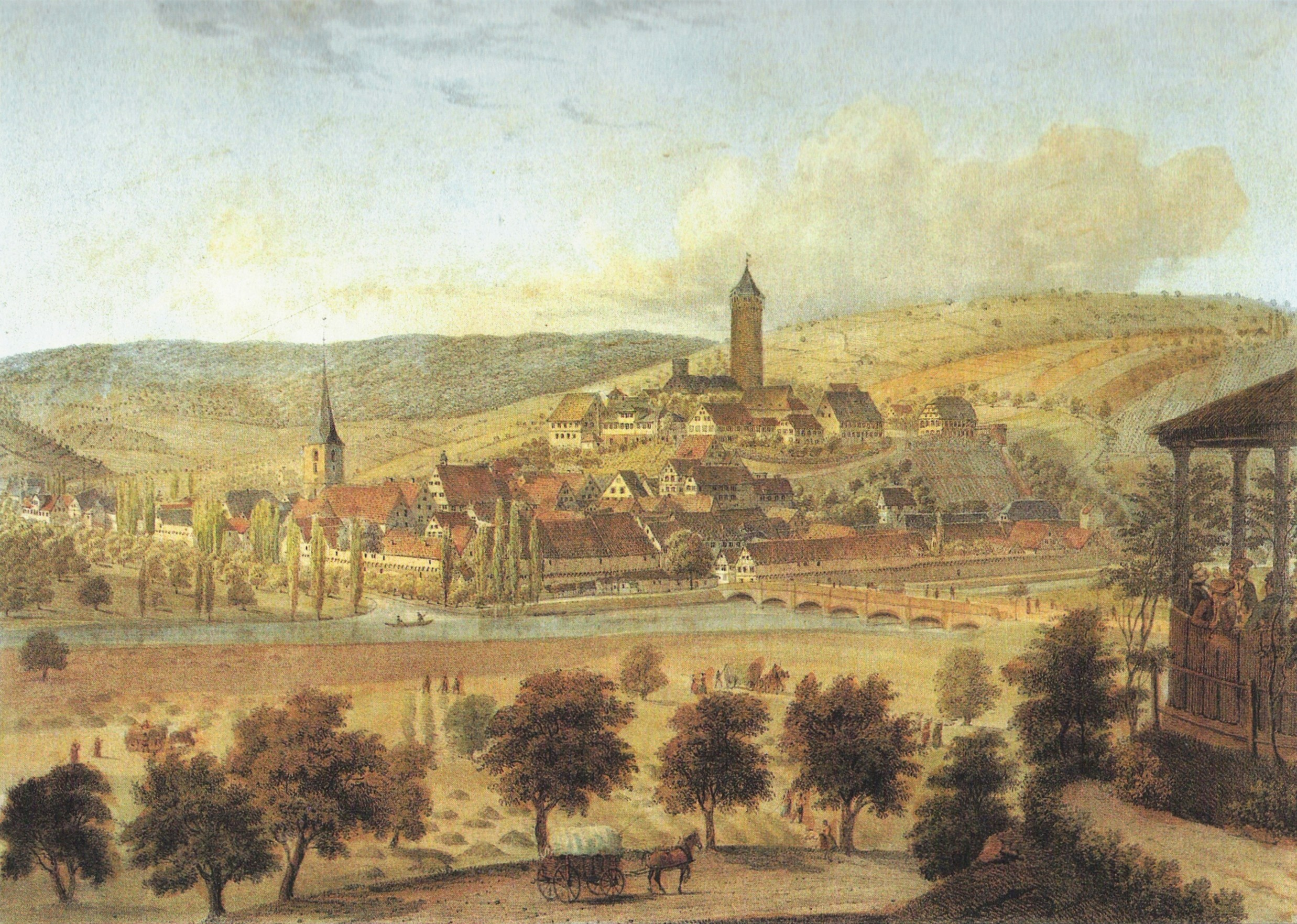 „Möckmühl von Süden“, Kolorierte Lithographie